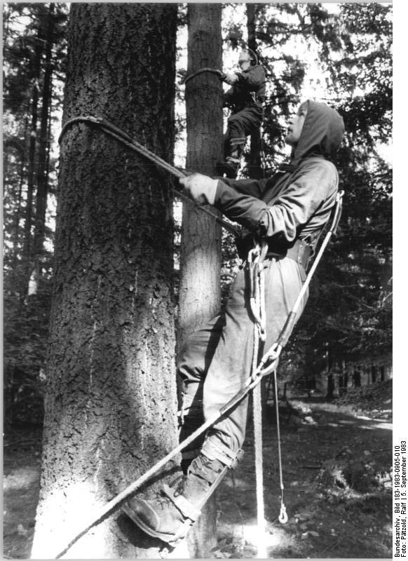 Lützow, Zapfenpflücker ADN-ZB Pätzold-5.9.1983 Bez. Schwerin: Zapfenpflücken- In vollem Gange ist derzeit die Ernte der Douglasienzapfen in den Forstrevieren des Bezirkes Schwerin. Zwölf besonders ausgebildete Zapfenpflücker, hier Helmut Wilke (r.) und Andreas Fünning, gewinnen so wertvolles Saatgut für die Erweiterung der Bestände. Mut und Geschicklichkeit sind gefordert, um die Zapfen auf den 25 Meter hohen Douglasien im Revier Lützow ernten zu können. - siehe auch 1983-0905-4 und 5N